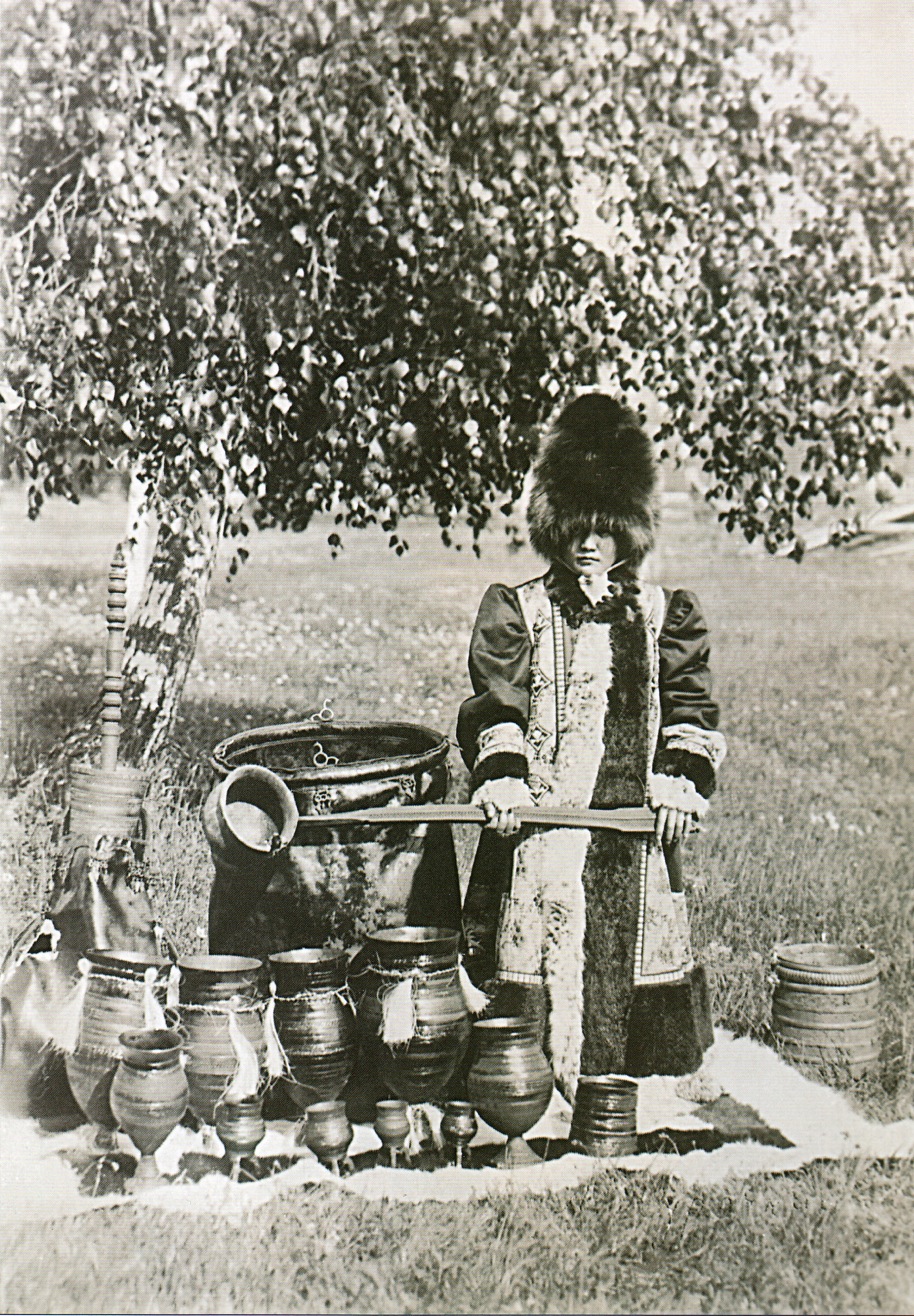 Bildunterschrift: Jakuten. Jakuten im Landeskostüm bei der Zubereitung vom Koumiss für das Isyakh-Festival, 1910. Russisches Museum für Ethnographie, St. Petersburg.